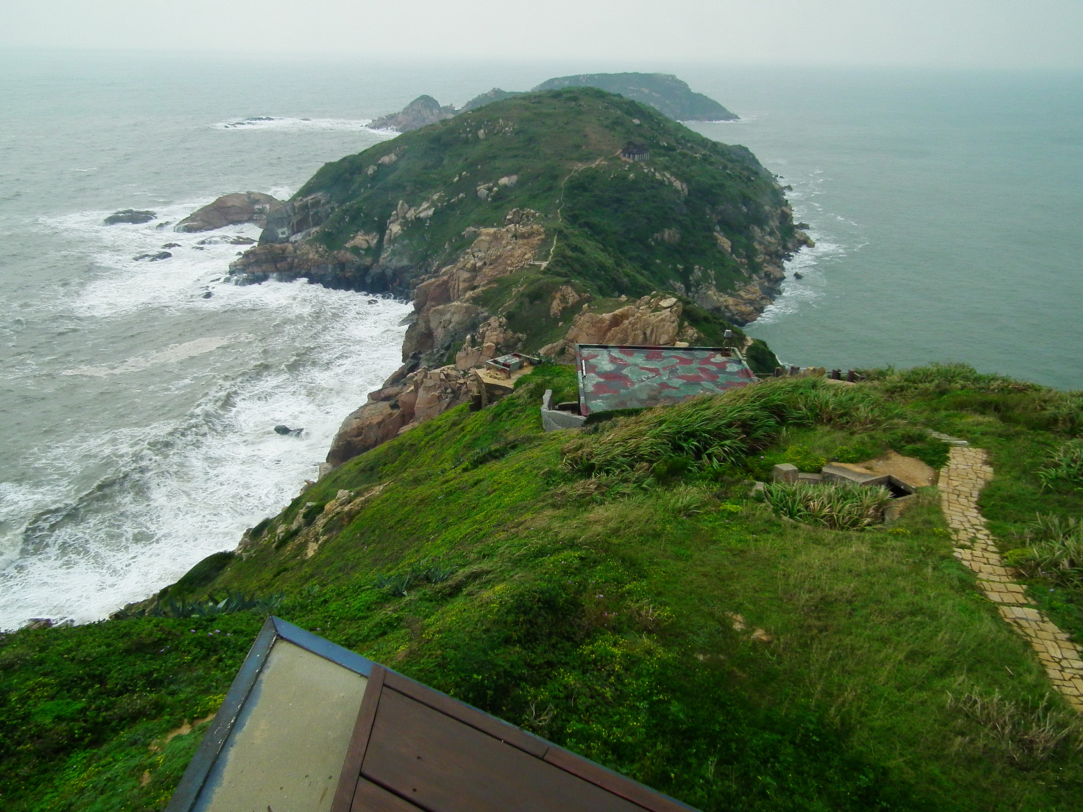 北竿螺山步道 Beigan Luoshan Trail